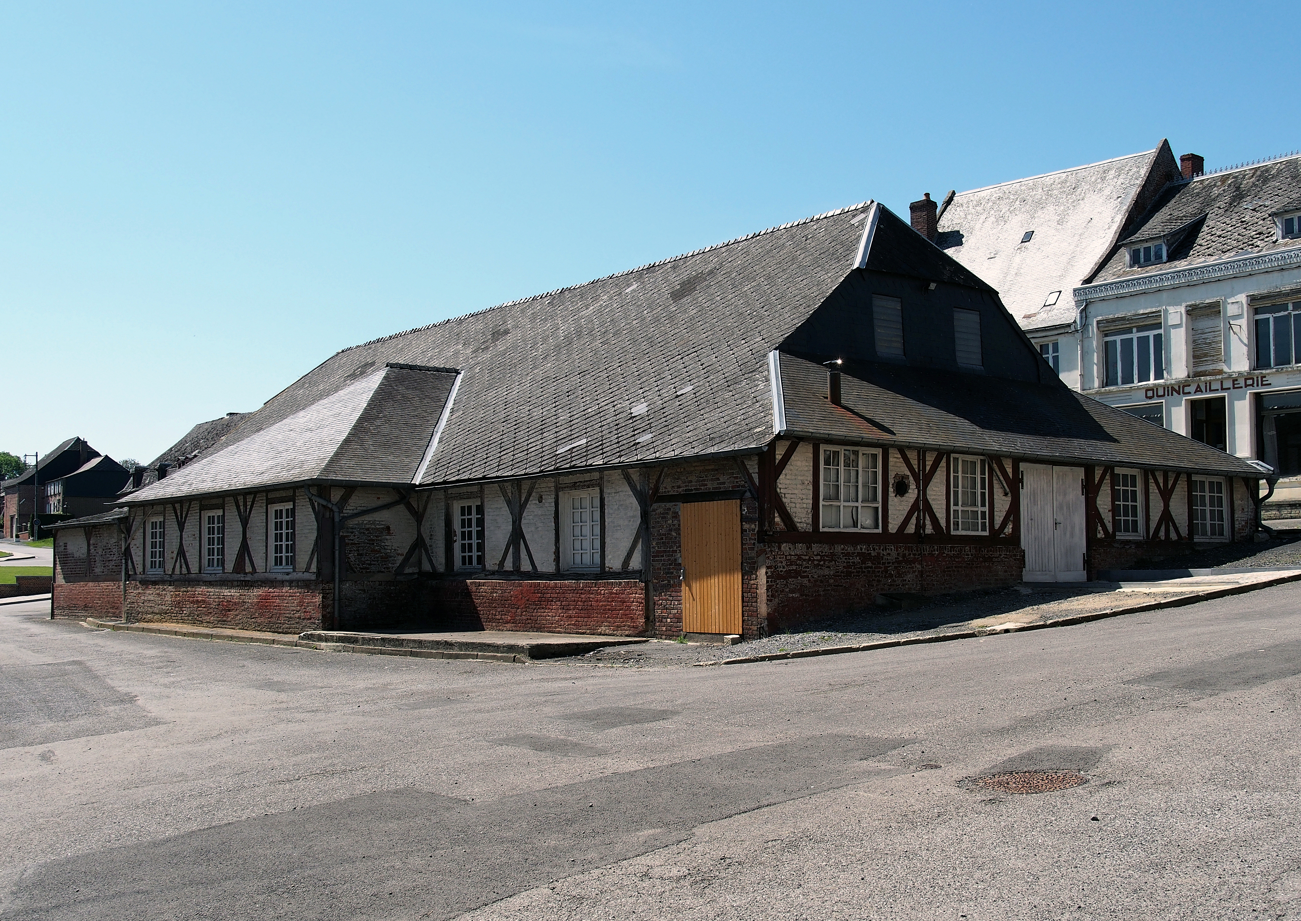 Halle de Plomion, Place des Templiers (Inscrit, 13 février 1998) .